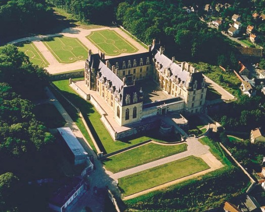 Le Château d'Ecouen et son parc vus du ciel.